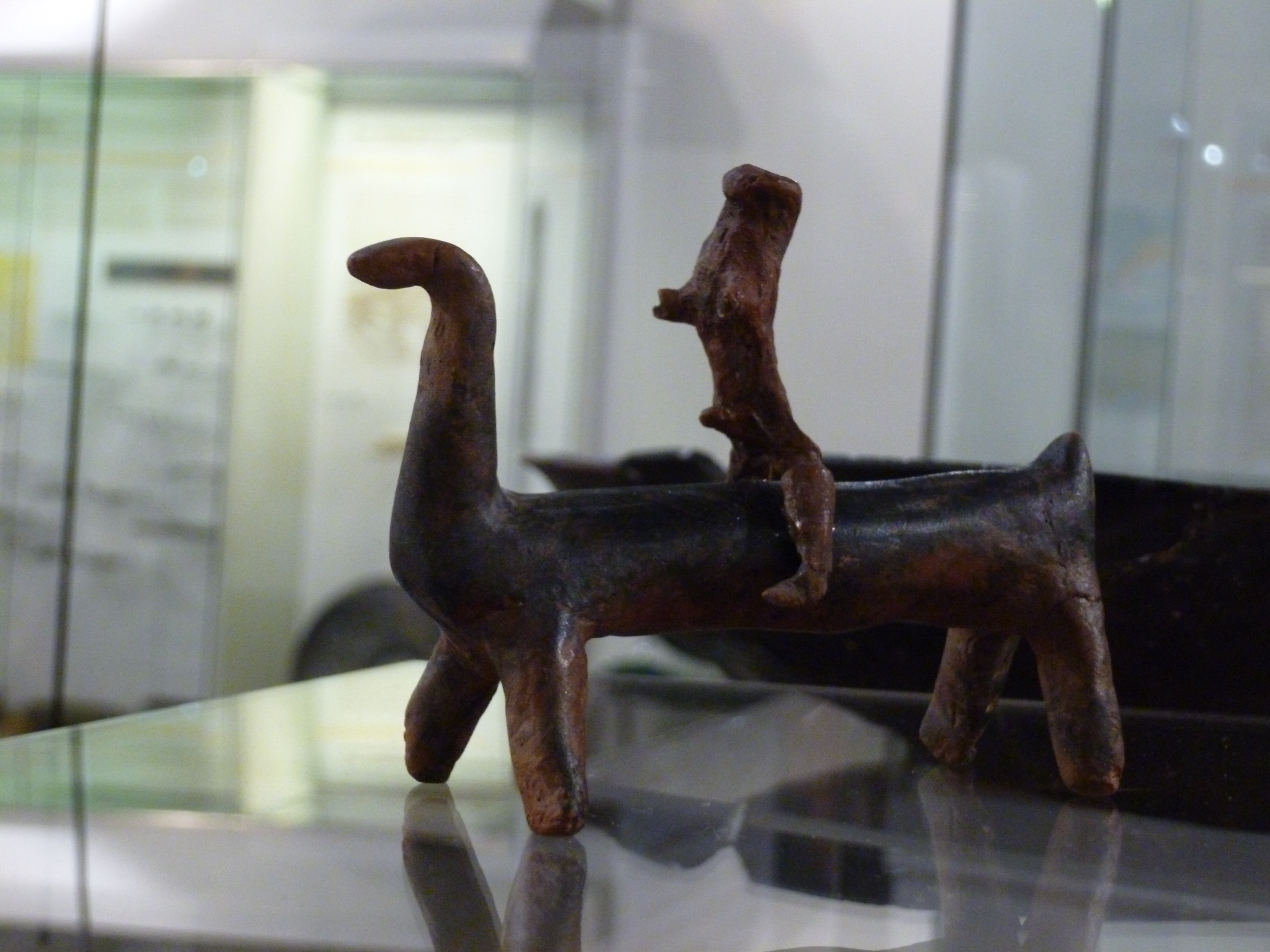 Tonfigur der Hallstatt/Latenezeit aus Speikern bei Nürnberg